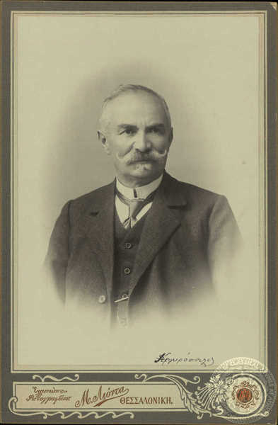 Йоанис Аргиропулос